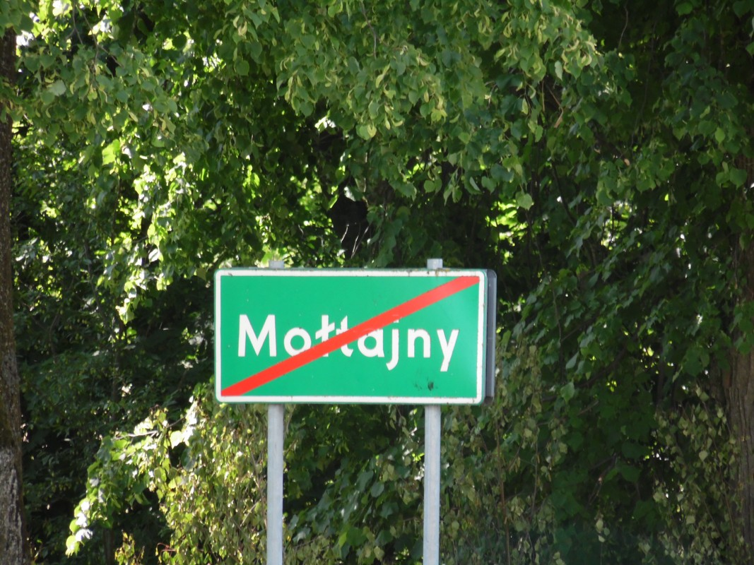 MOŁTAJNY. WYJAZD Z MIEJSCOWOŚCI.